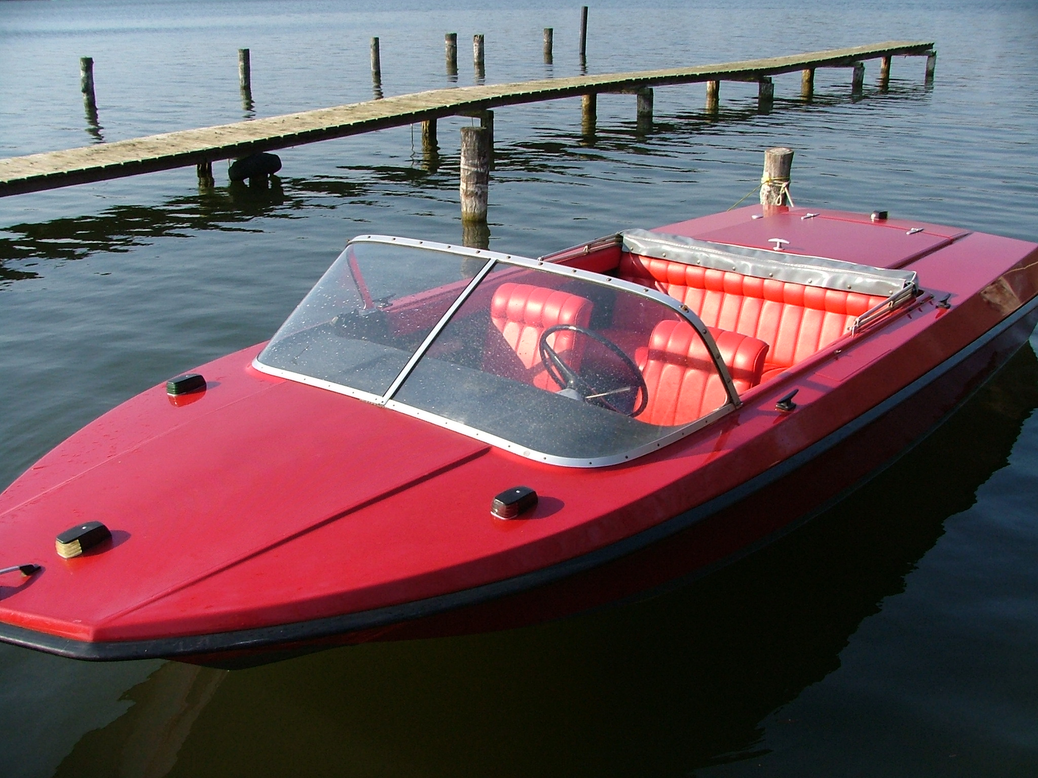 Motorboot Lotos I Baujahr 1980, aufgenommen am 25. März 2007 auf dem Scharmützelsee